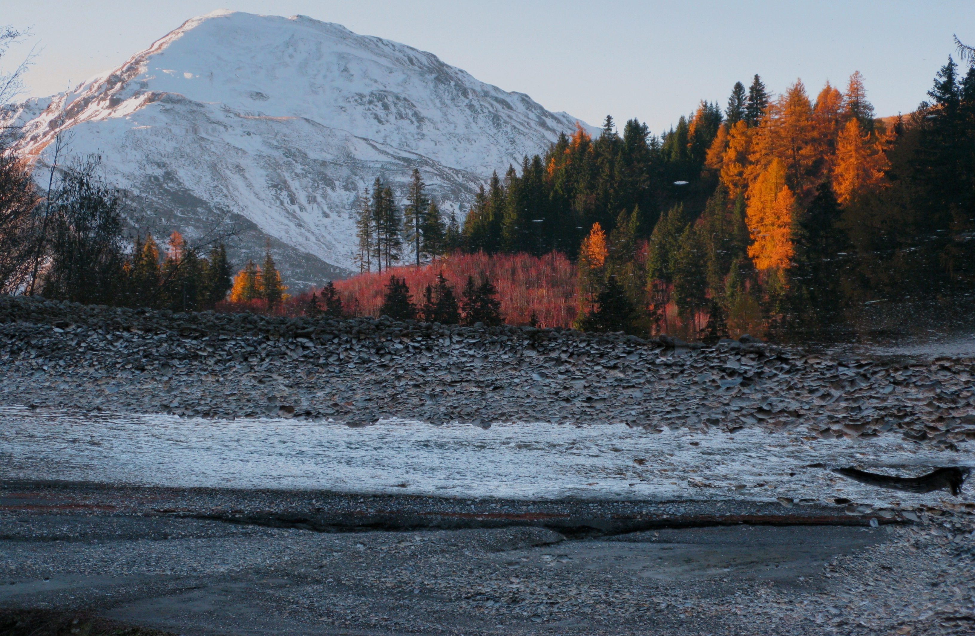 Montanges près de La Fouly (VS) se reflètent dans la Dranse